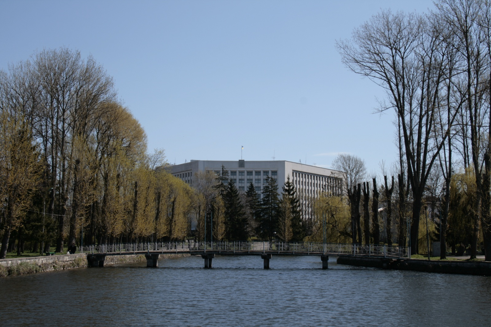 Тернопільська обласна державна адміністрація. Вигляд з Парку імені Тараса Шеченка